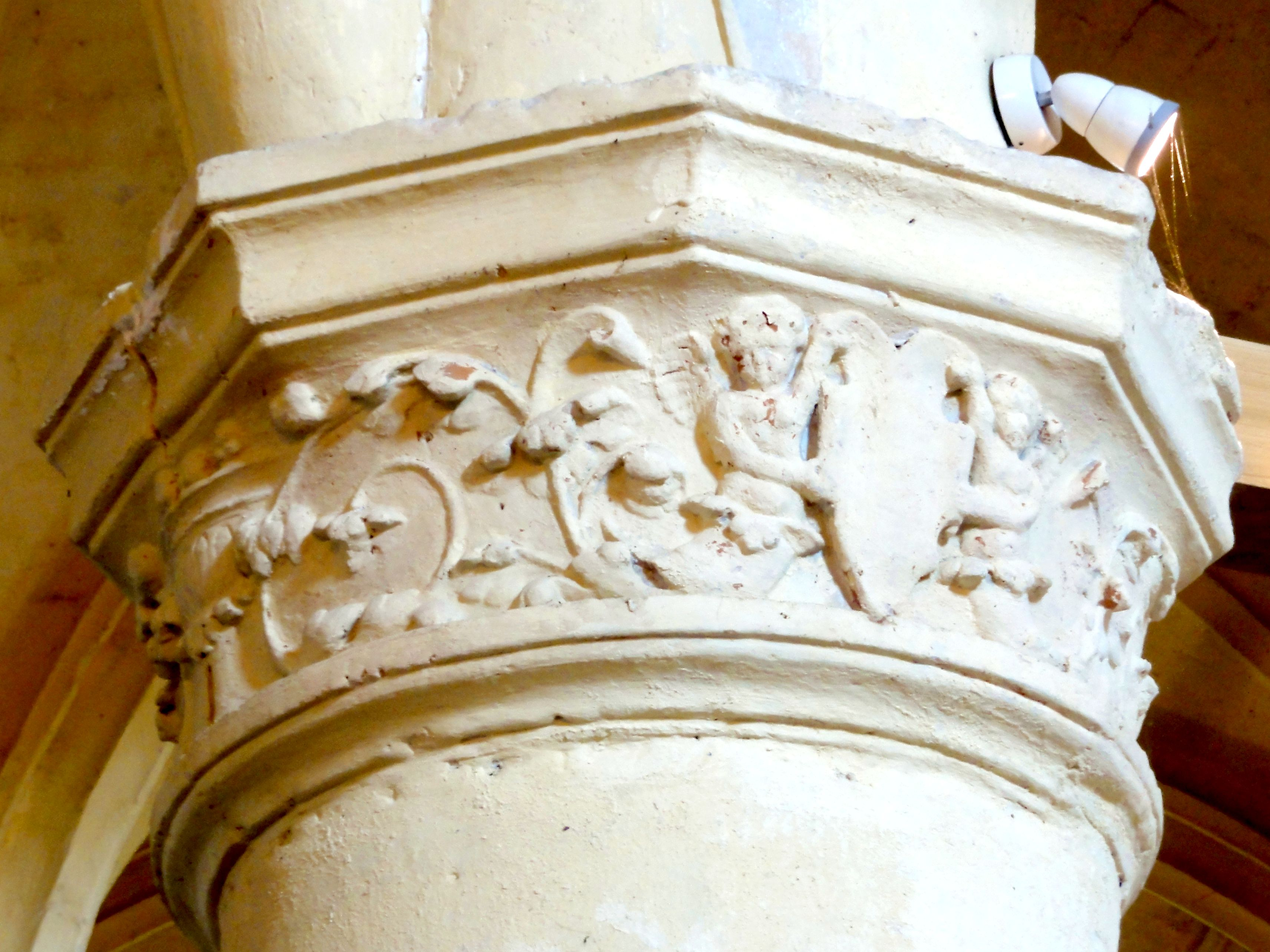 Chœur, grandes arcades du nord, chapiteau du pilier intermédiaire.